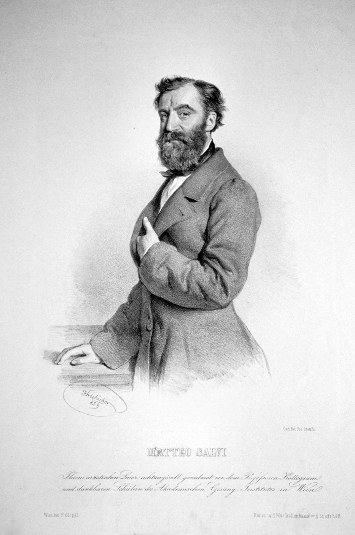 Matteo Salvi (1816-1887), Komponist, 1861-67 Direktor der Wiener Hofoper. Lithographie von Josef Kriehuber, 1859